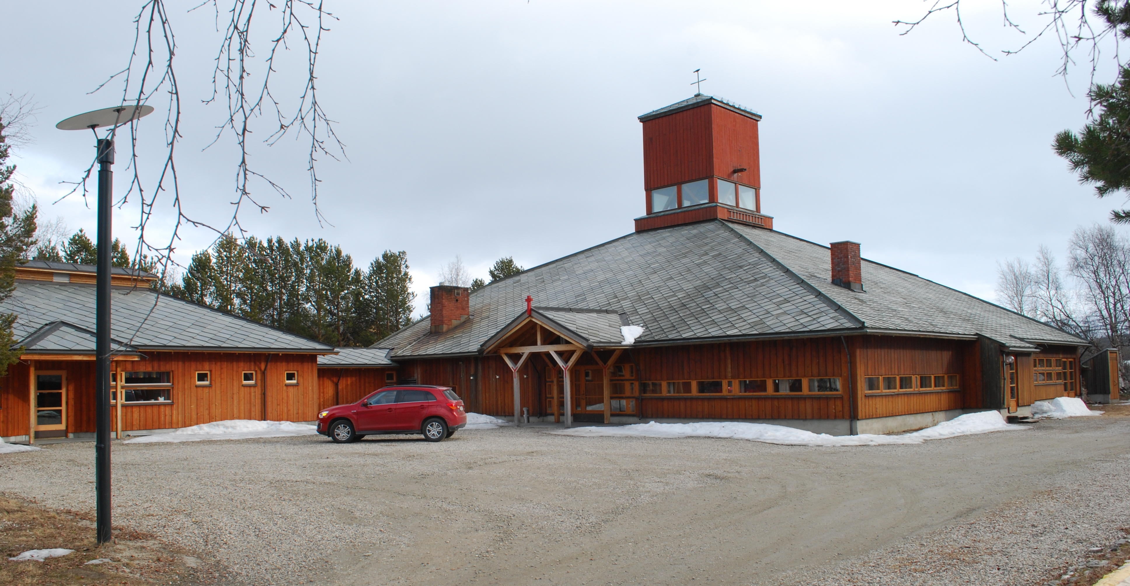 Karasjok kirke, med kontordel til venstre og hovedinngang